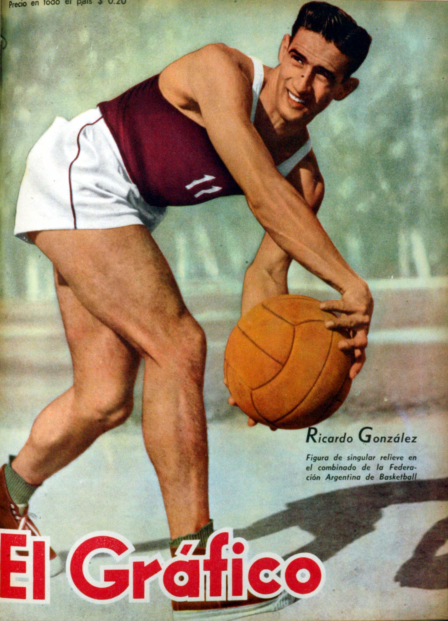 El Grafico del 04 de Abril de 1947. Edicion 1447